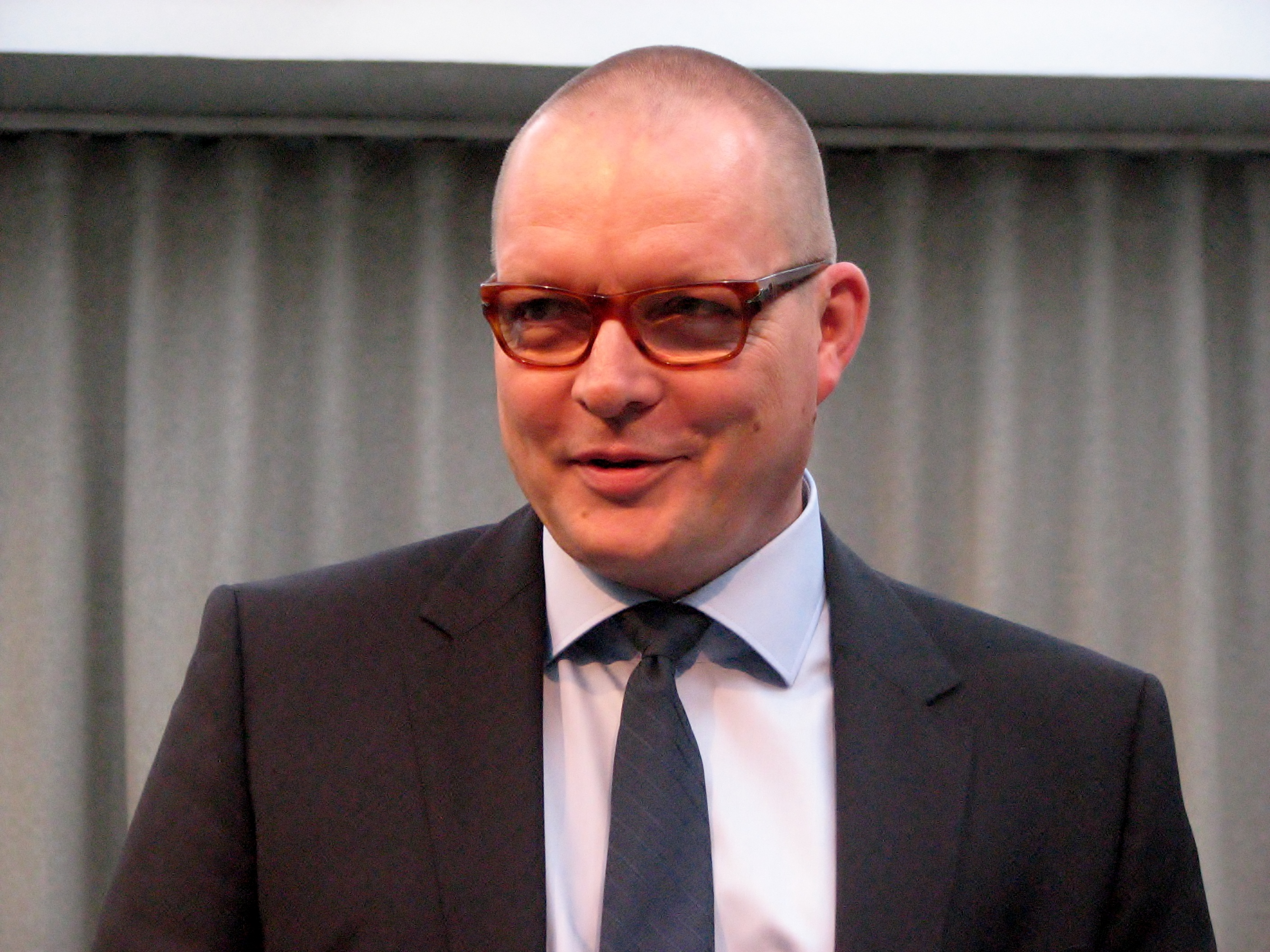 Peeter Jalakas Estonia maja juubelipidustuste raames autogrammitunnis